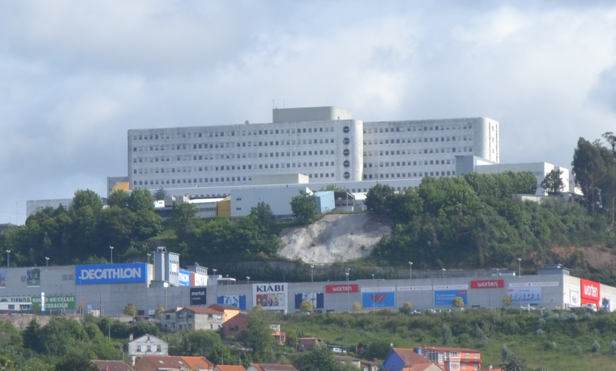 Hospital do Meixoeiro dende a rúa Ramón Nieto